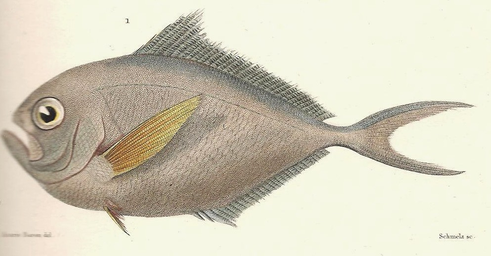 Planche N°44 du livre "Le règne animal distribué d'après son organisation" par Georges Cuvier (Tome 8), seconde édition de 1828, représentant : Brama australis